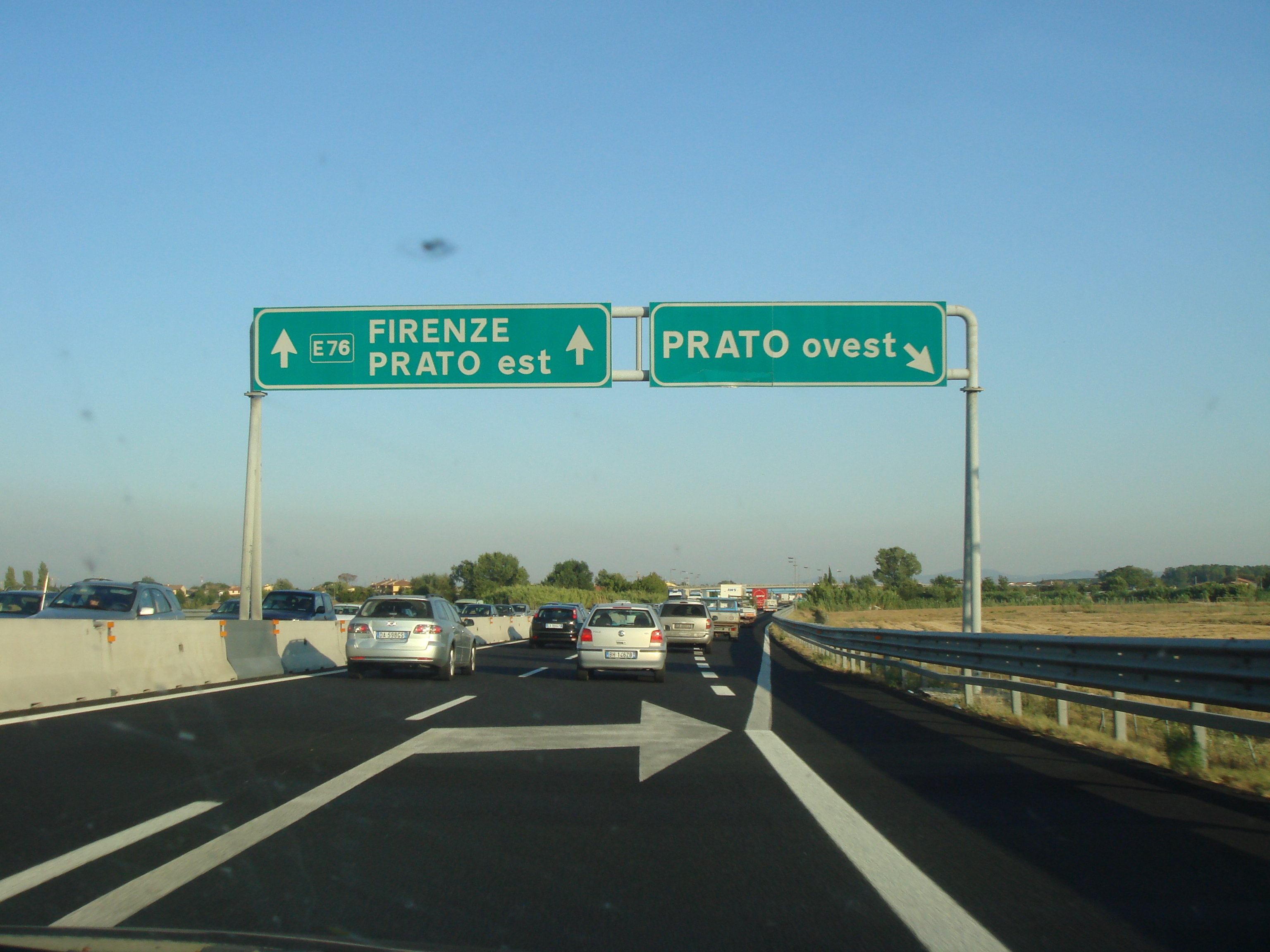 Autoroute E76 en Italie entre Pise et Florence